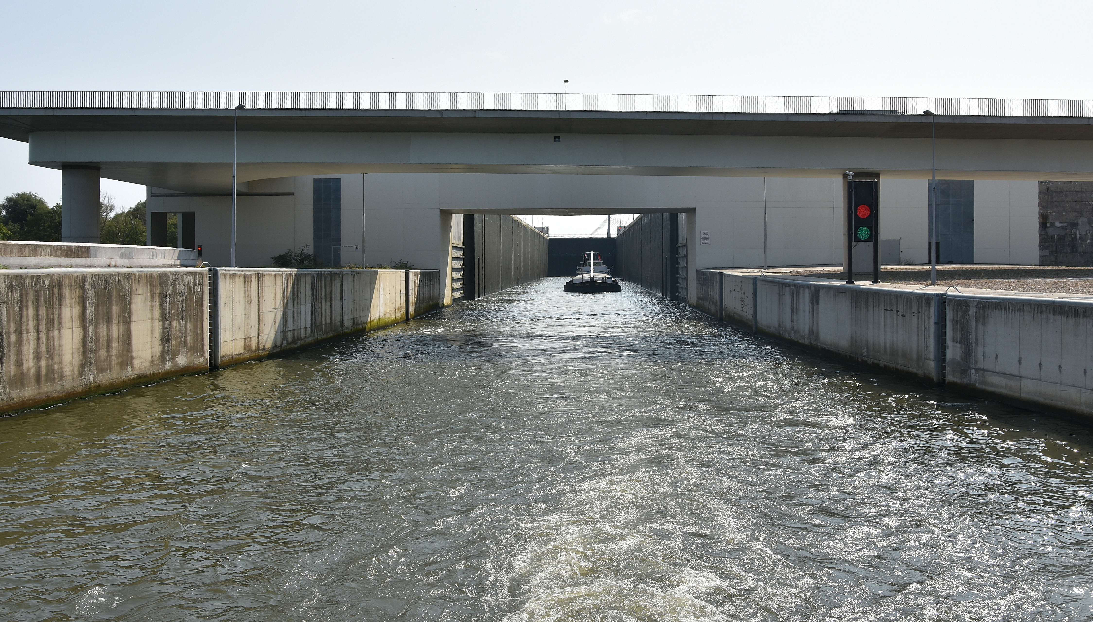 Sluis Klein-Ternaaien 28-08-2018 14-57-31 This photo of immovable heritage has been taken in the Walloon Region